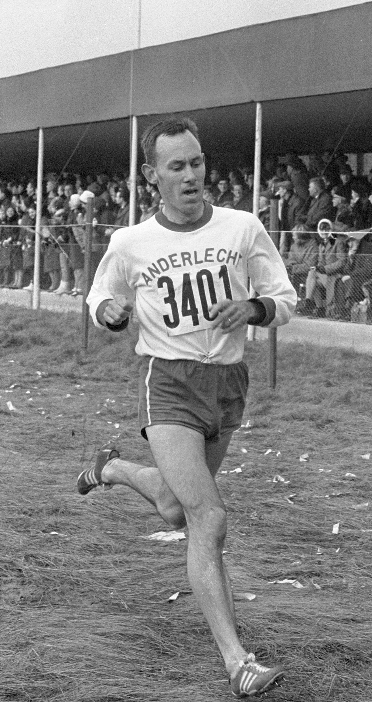 De Belgische loper Eugene Allonsius gaat door finish.